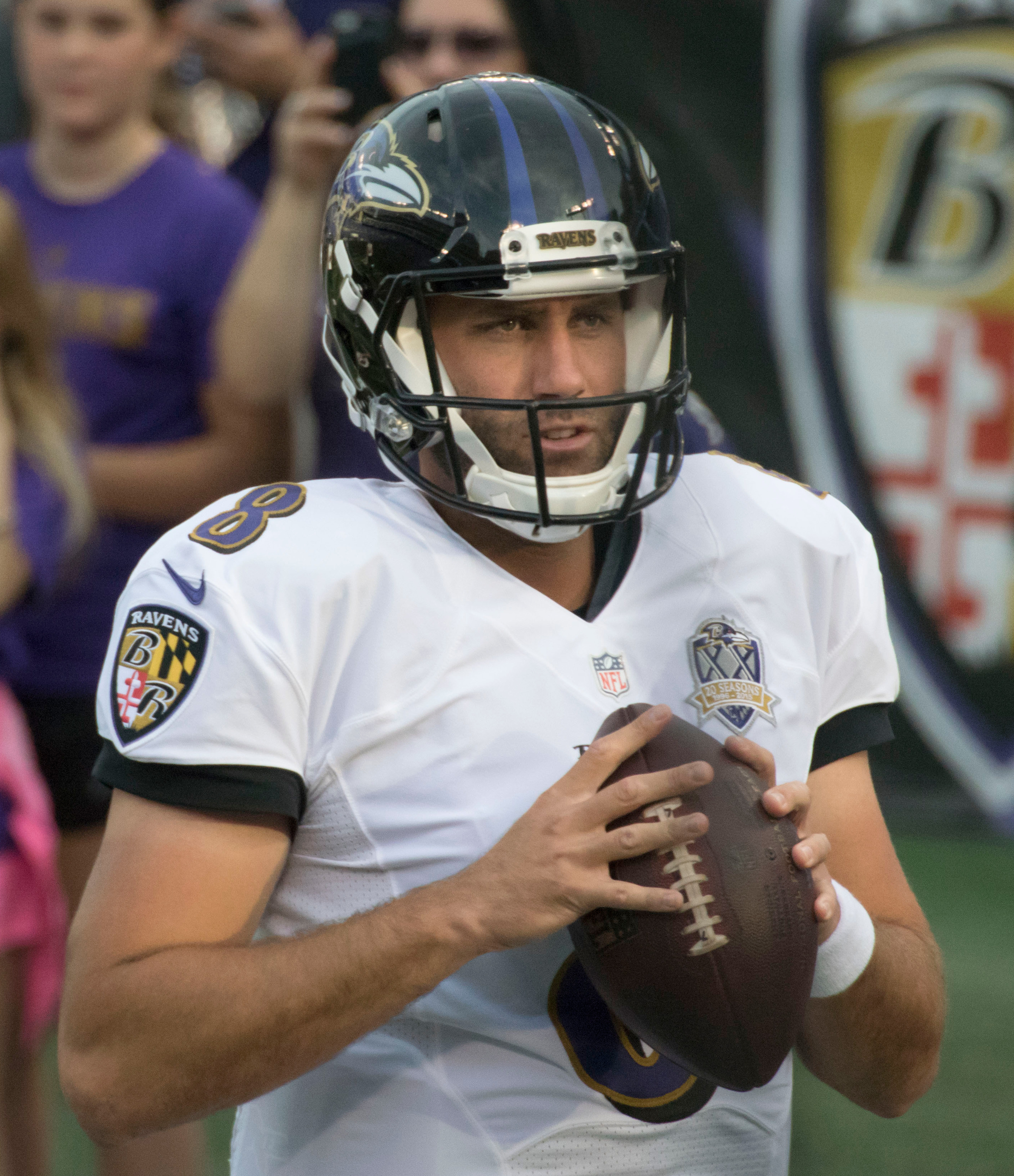 Saints at Ravens 8/13/15